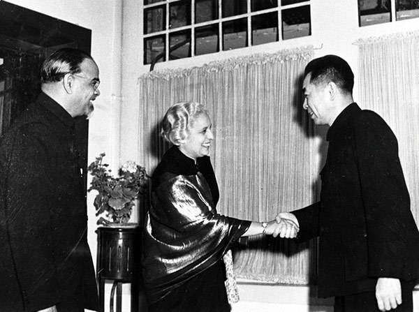 周恩来总理会见印度总理尼赫鲁的妹妹潘迪特和印度驻华大使潘尼迦